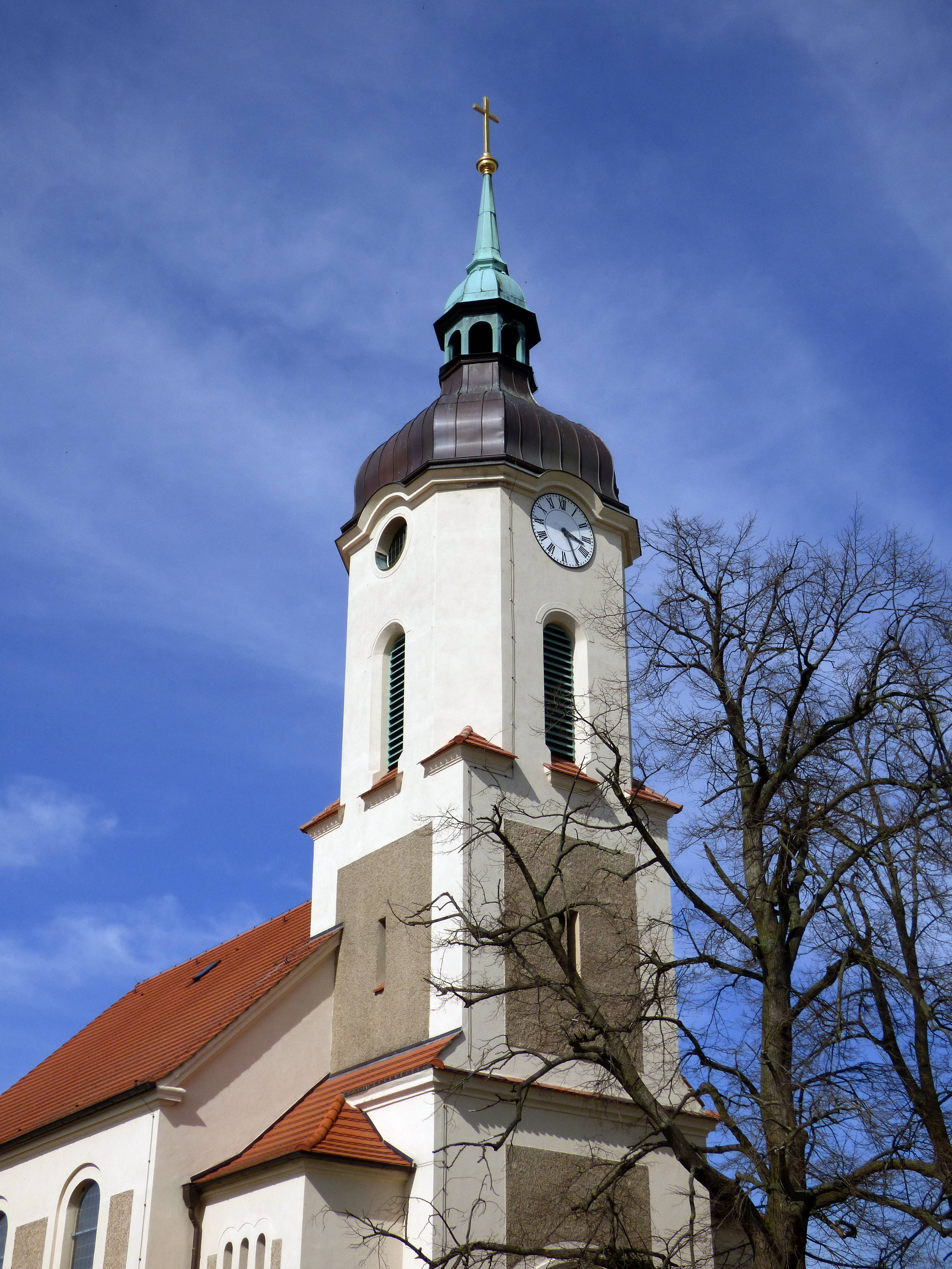 Dorfkirche Nauwalde